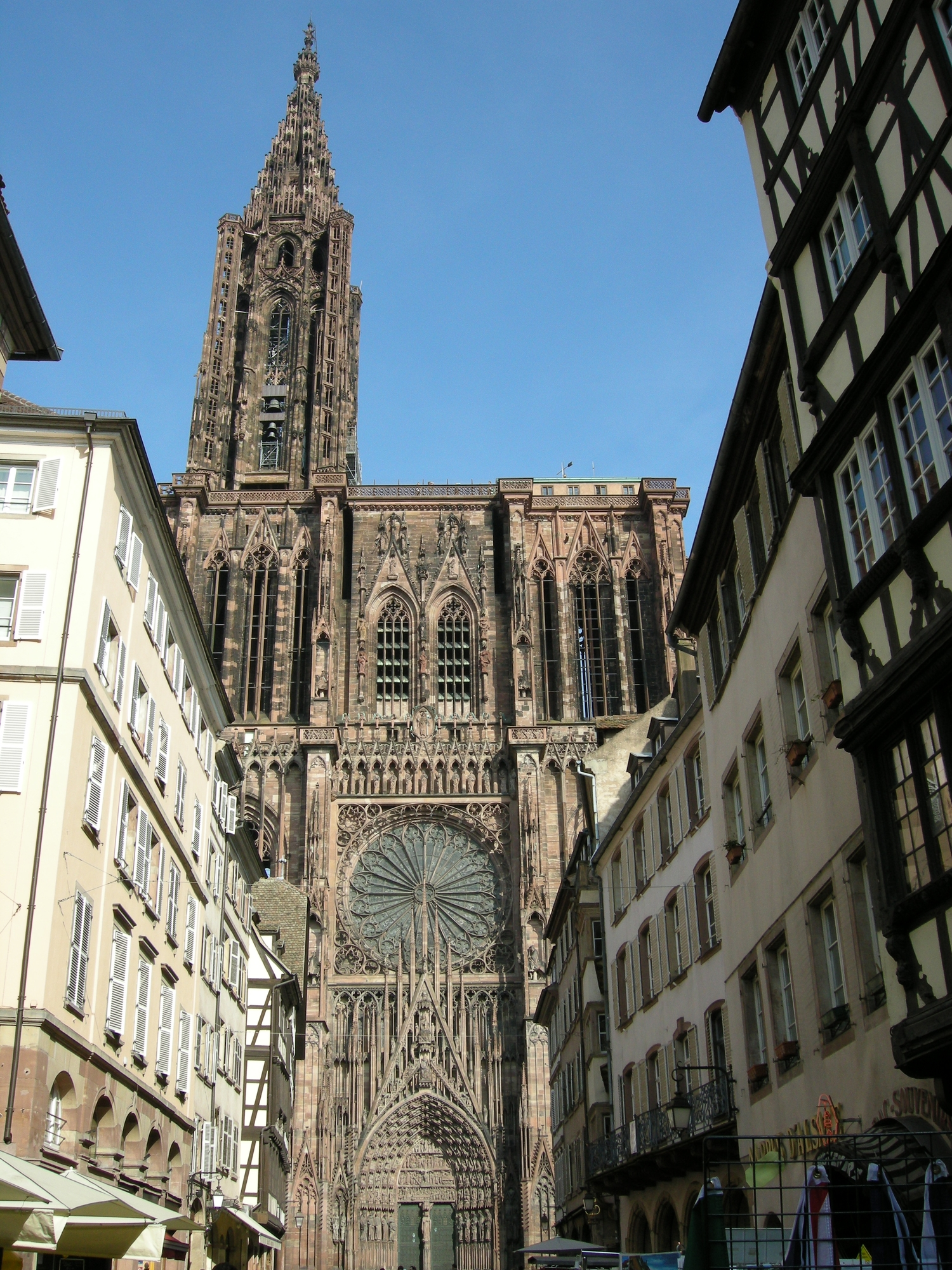 Façade ouest de la cathédrale Notre-Dame de Strasbourg (wp-FR), photographiée depuis le débouché de la rue Mercière sur la place Gutenberg.